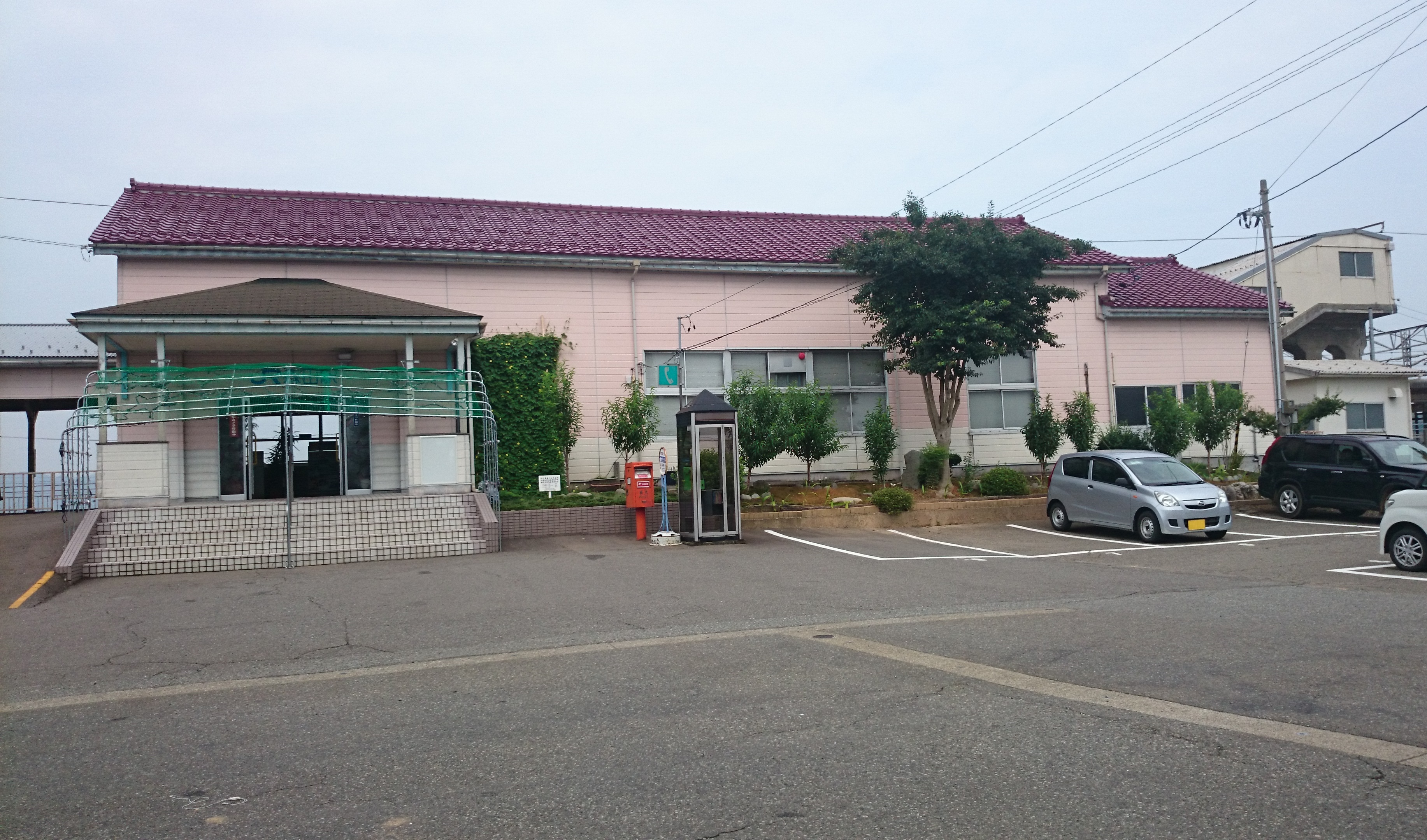 JR西日本・北陸本線の森田駅（福井県福井市）。本人撮影。